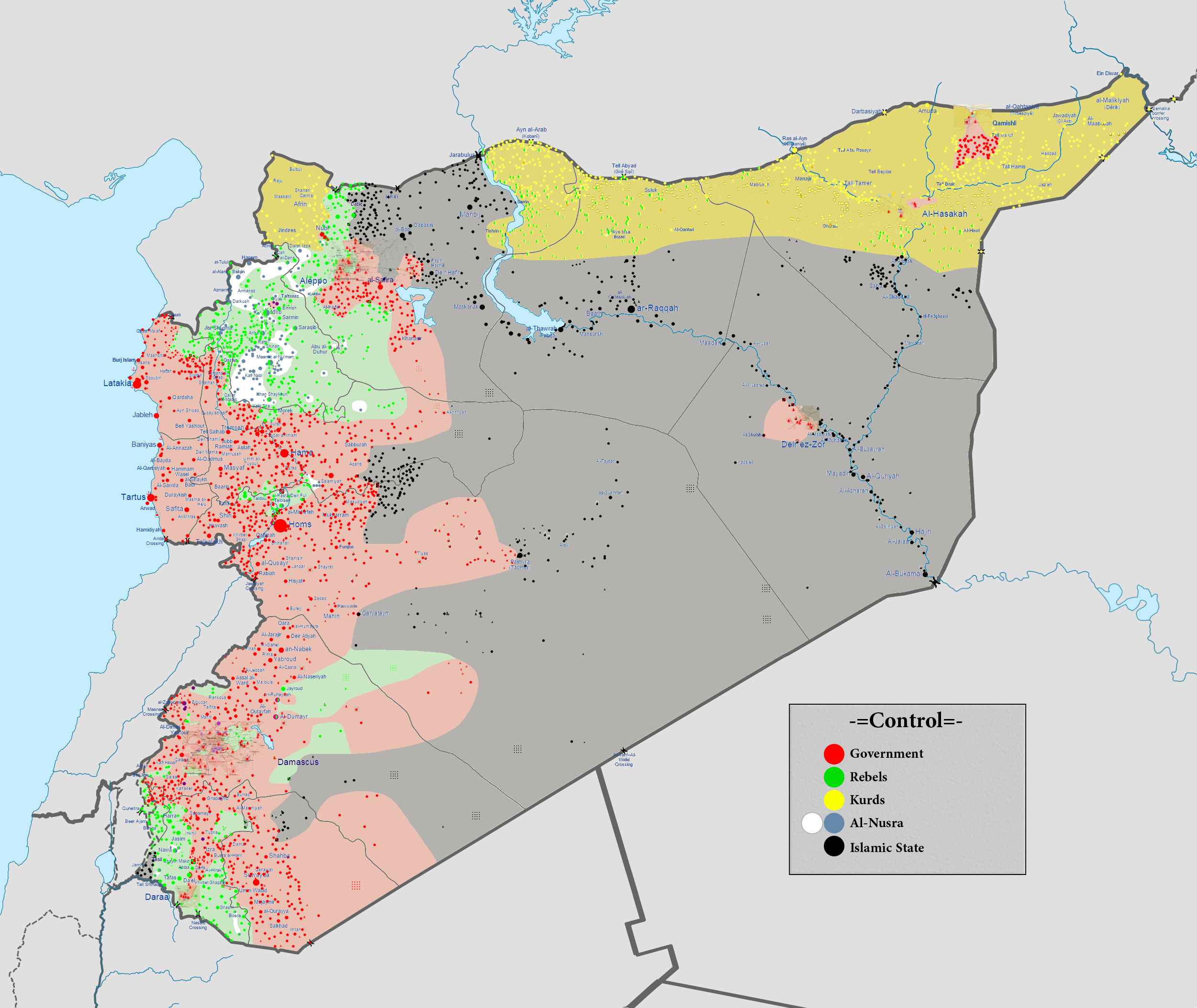 Guerre civile syrienne au 1er janvier 2016